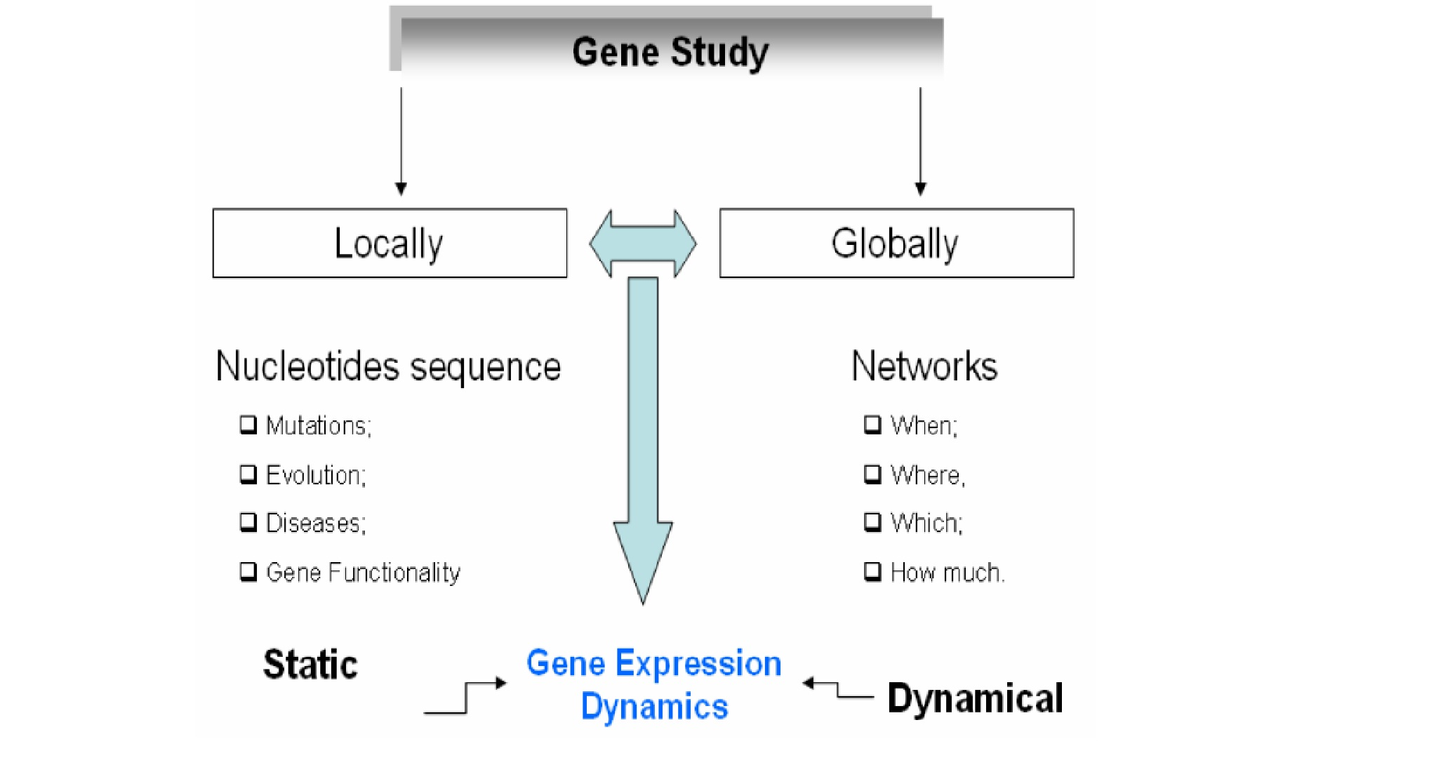 Comparação entre as duas forma de estudar o genoma, estática e dinâmica.